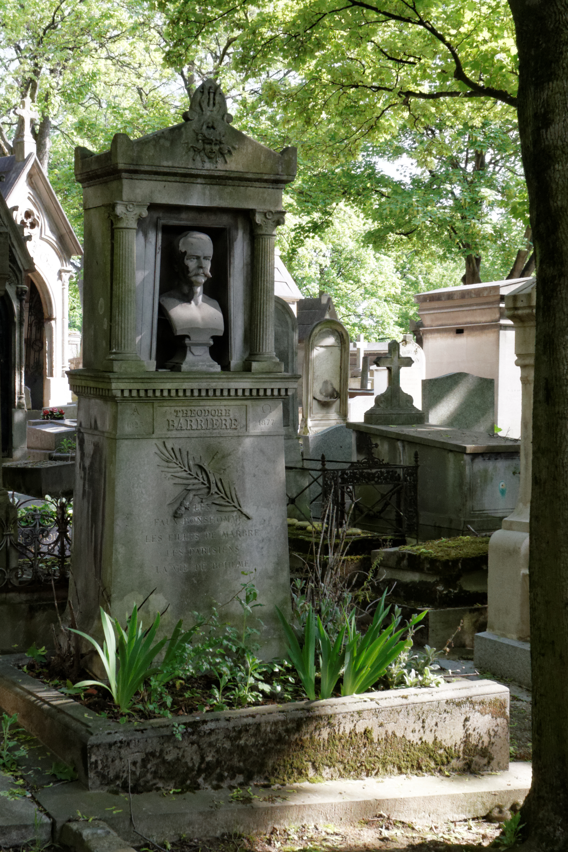 Sépulture de Théodore Barrière (1823-1877), auteur dramatique. Cippe surmontée d'un buste en marbre.